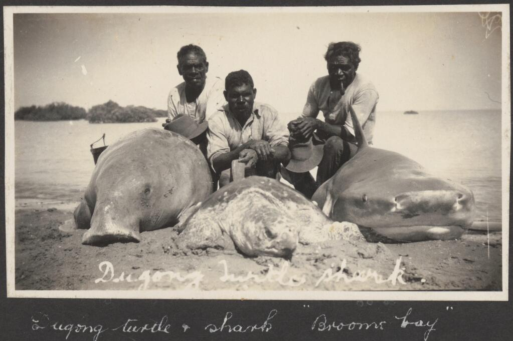 Bourue, R. A Persistent URL .au/nla.obj-138407882